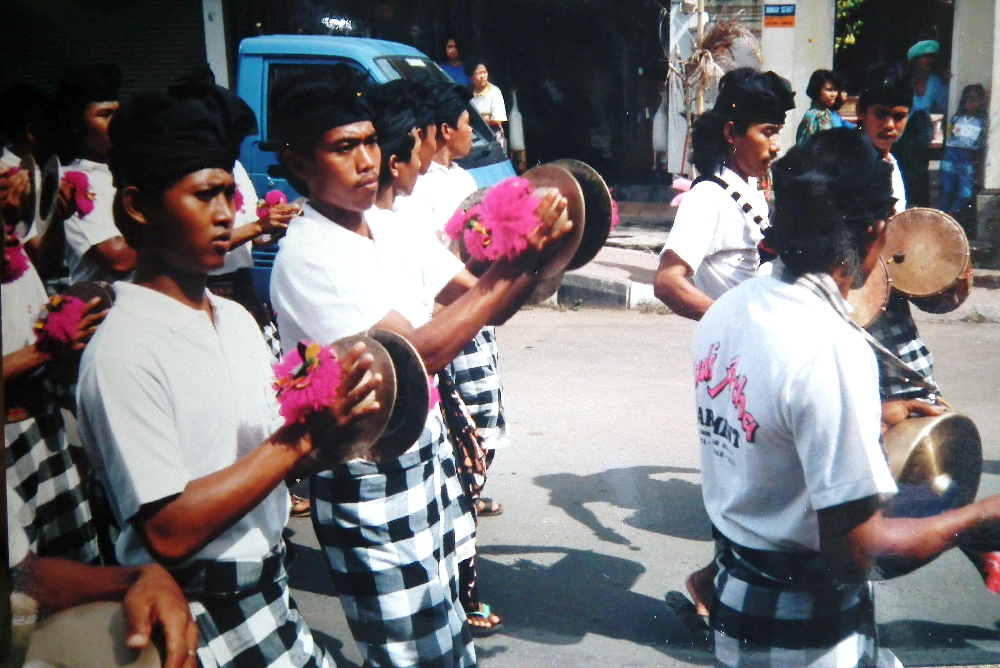 Funeral of Bali Hinduism バリ島の葬儀 1992年 撮影：松岡明芳